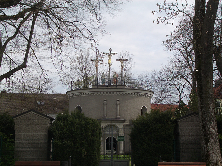 Klosterlechfeld, Germany: Kalvarienberg am Franziskanerplatz